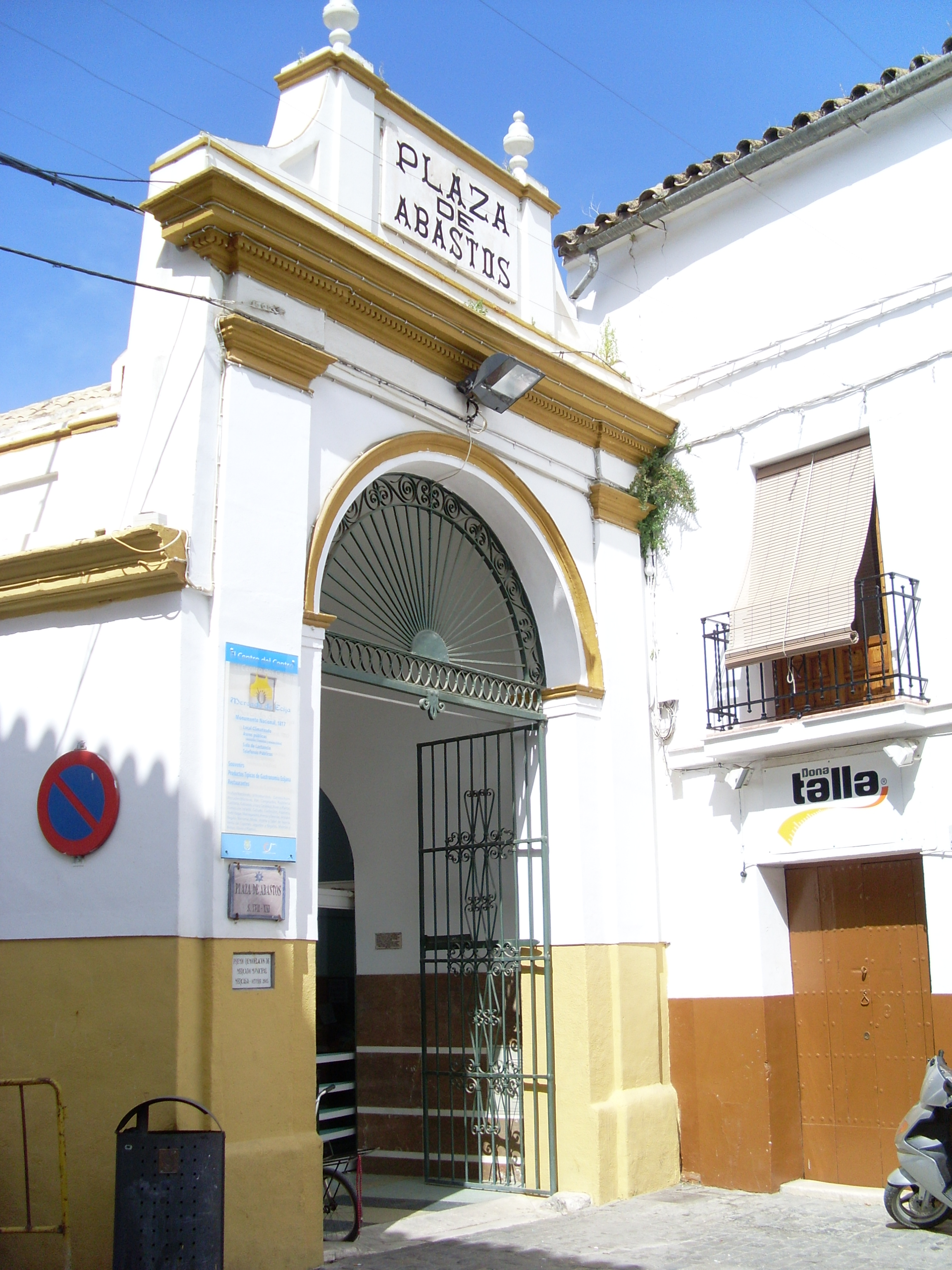 Ecija`s market